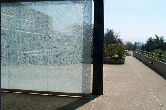 Petr Kvíčala - Polytechnika EPFL, Lausanne, arch. Ivan Koleček.